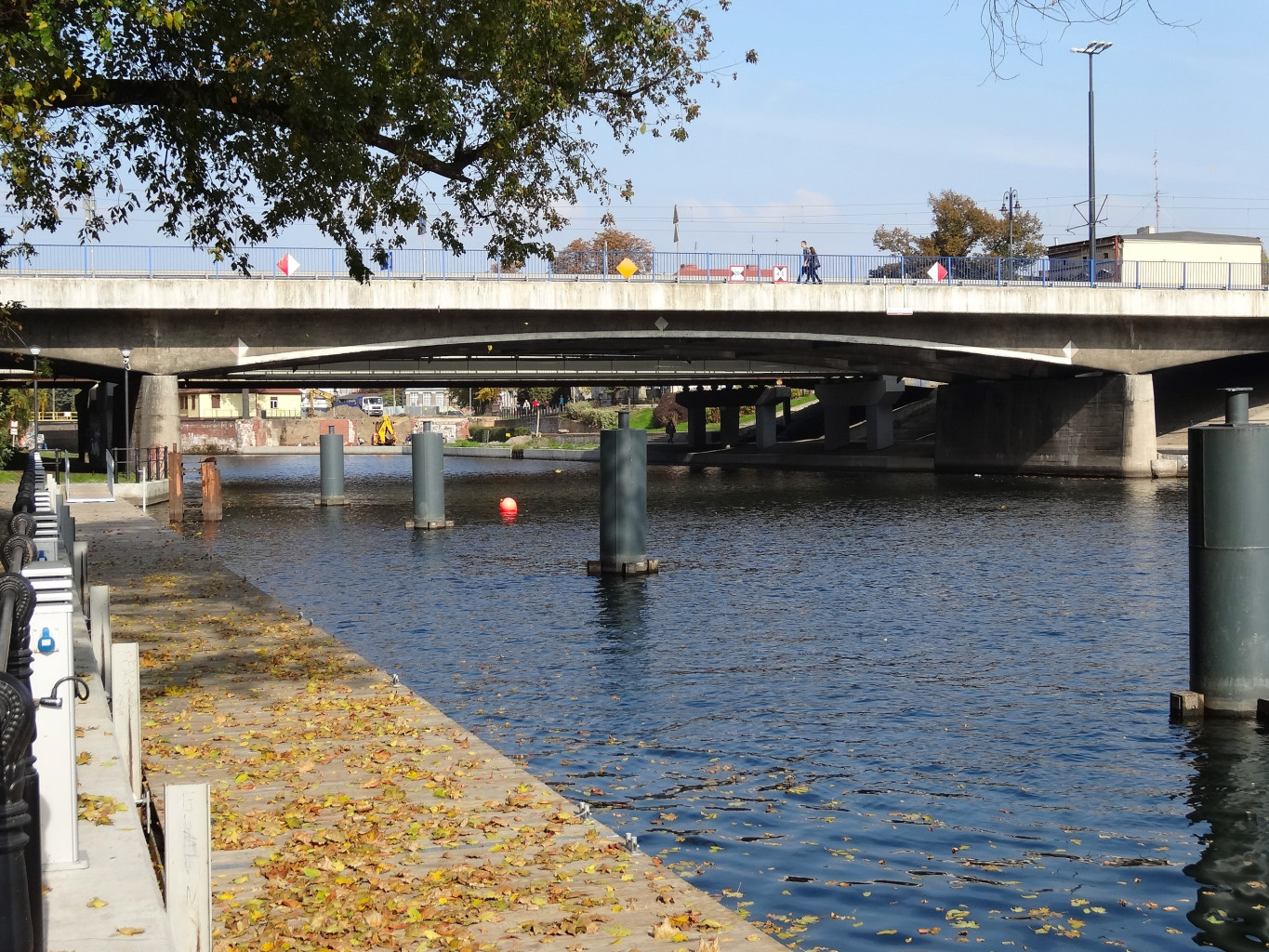 Mosty Solidarności w Bydgoszczy